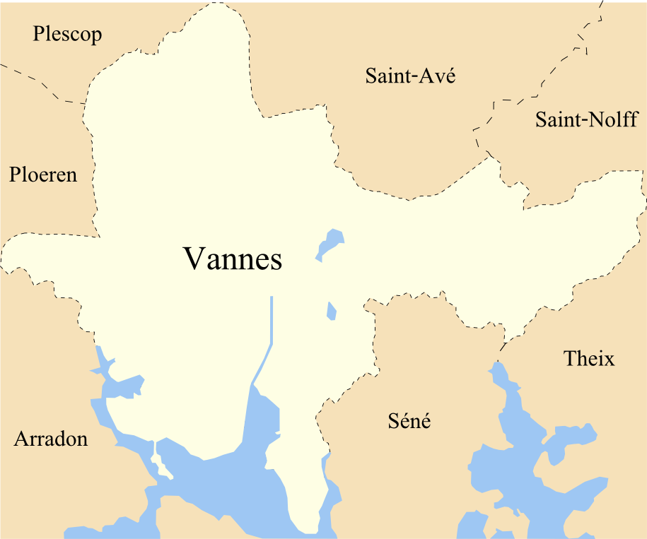 Territoire de Vannes et frontières administratives